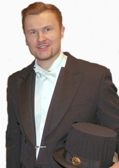 Image